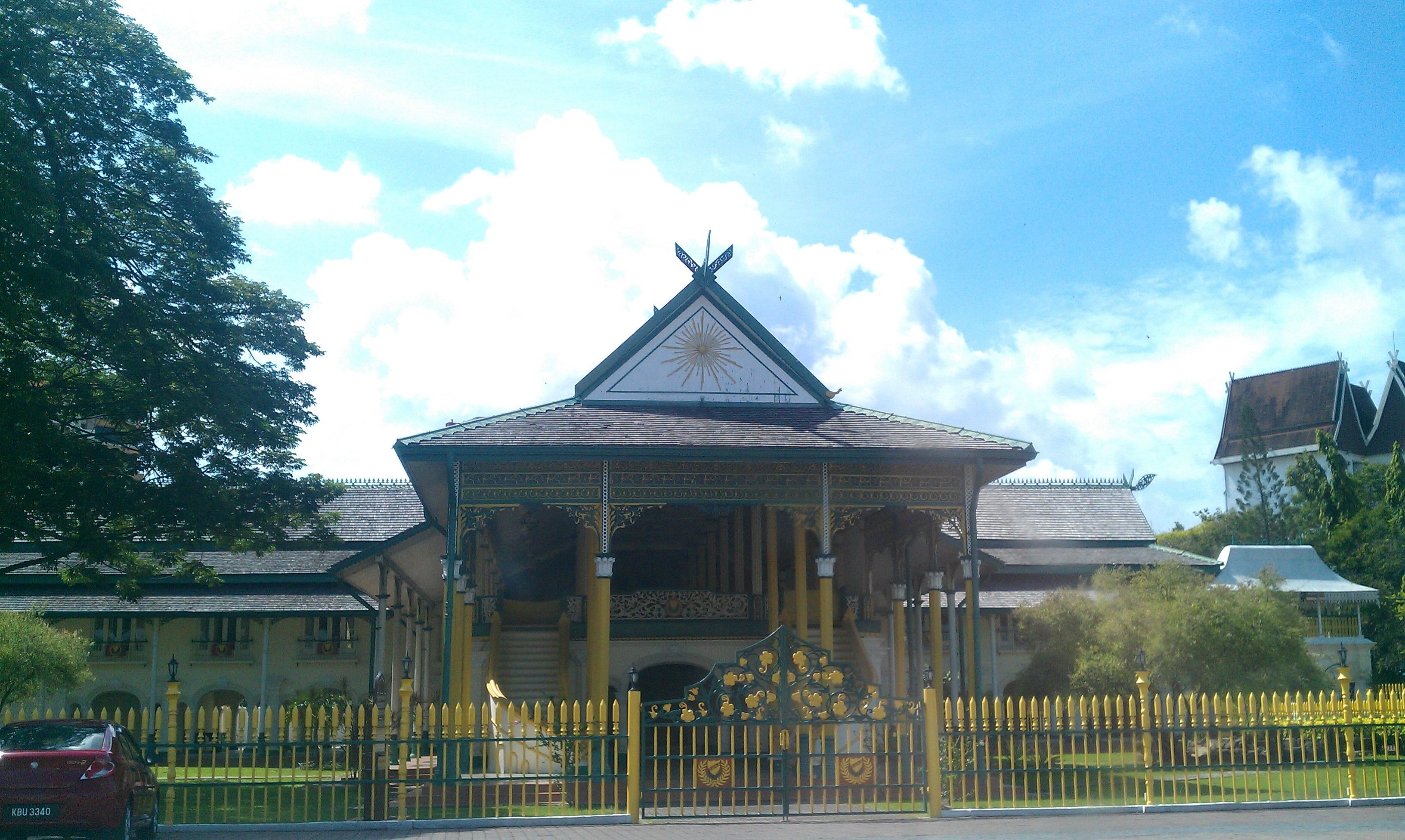 Balai Besar Alor Setar